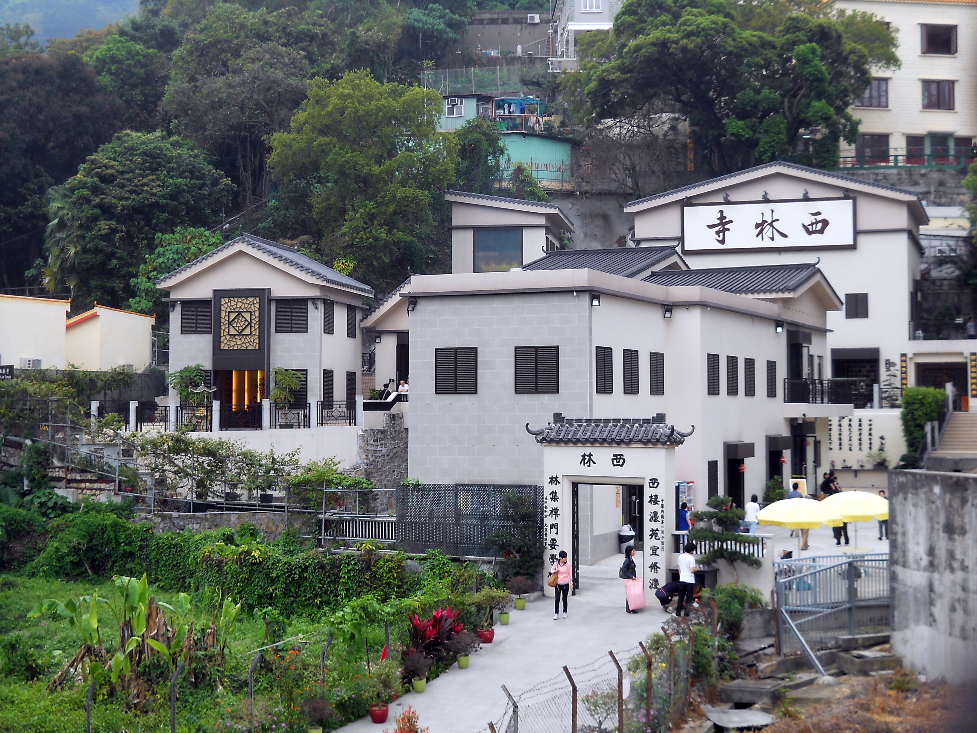 中文（香港）: 西林寺